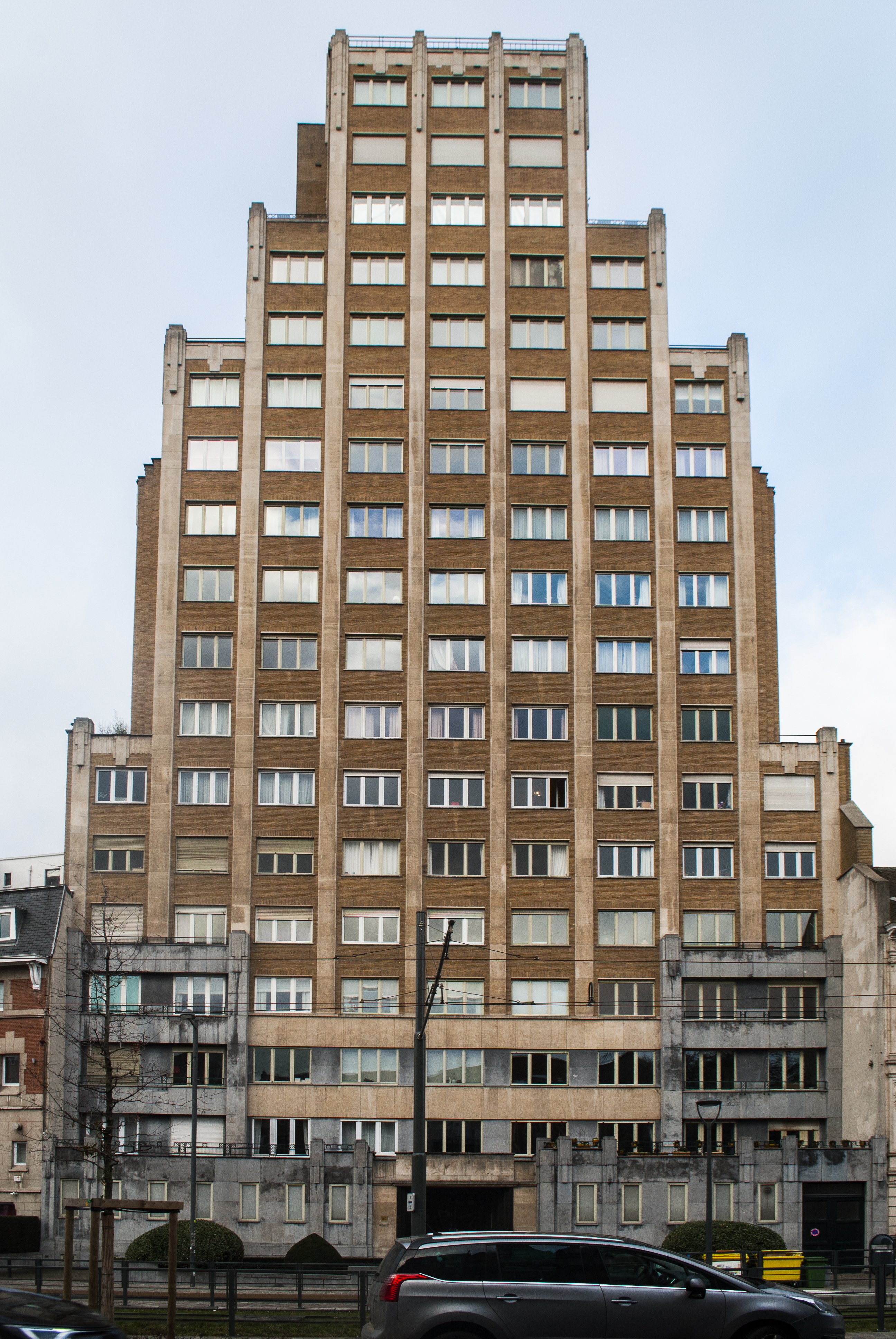 Résidences de la Cambre